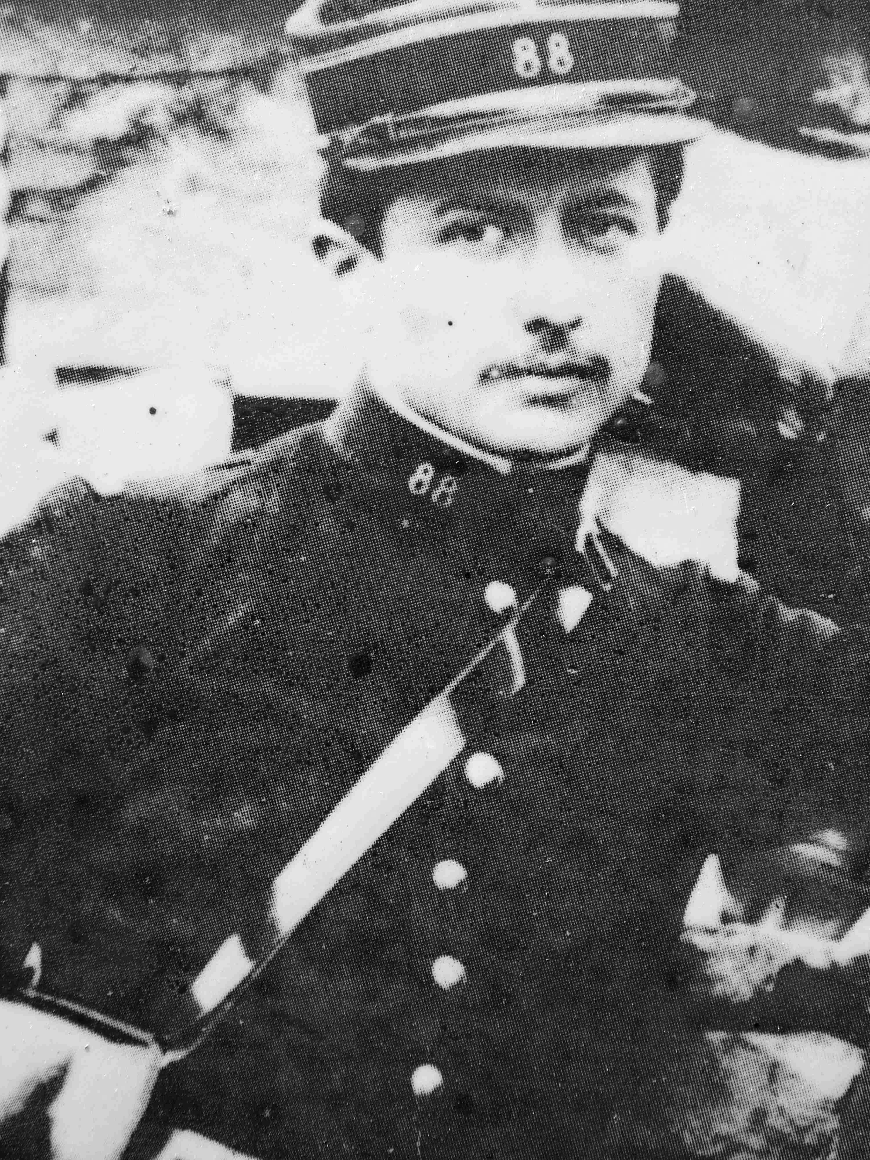 Alain-Fournier (1886-1914), lieutenant en 1913 aux manœuvres de Caylus.